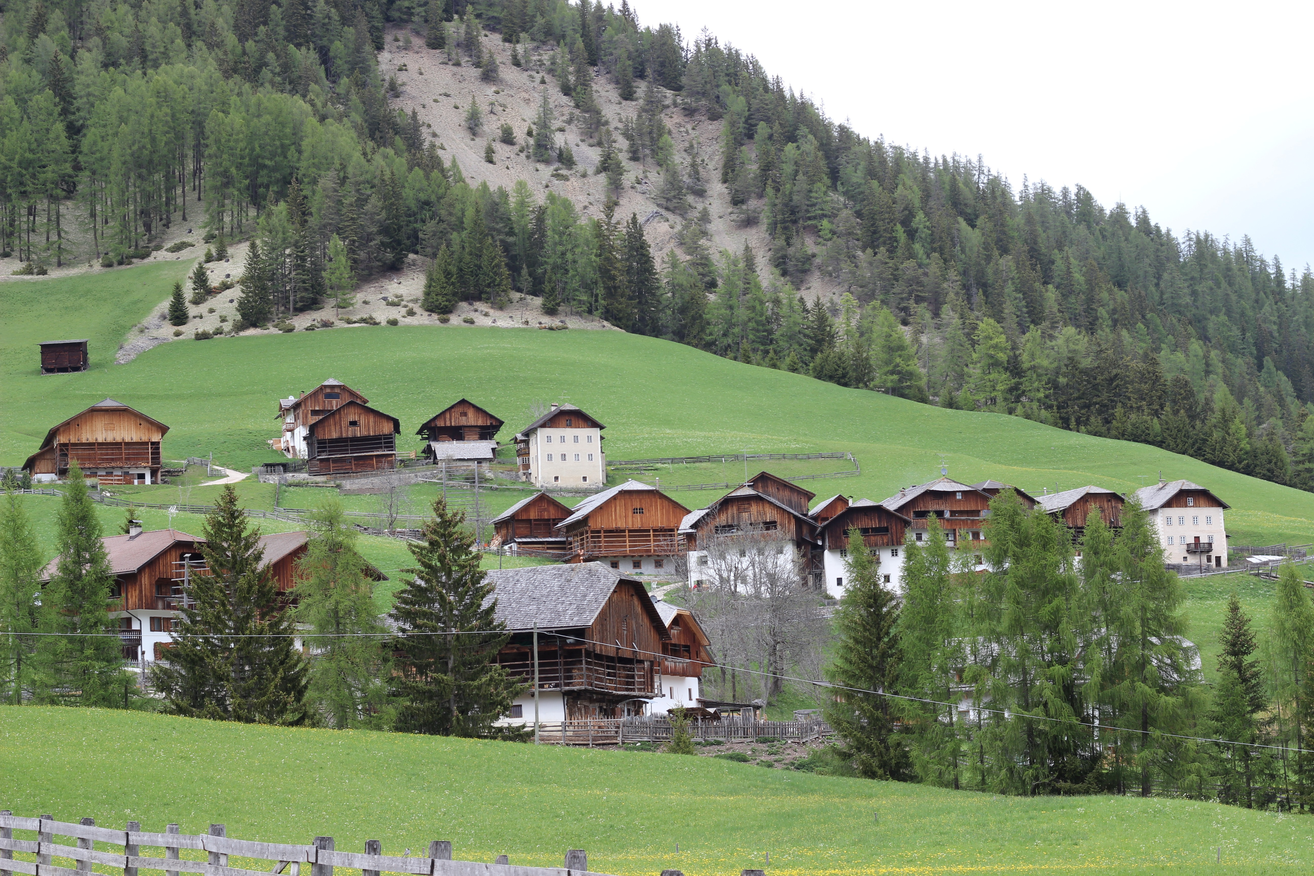 Der Weiler Seres in Lungiarü